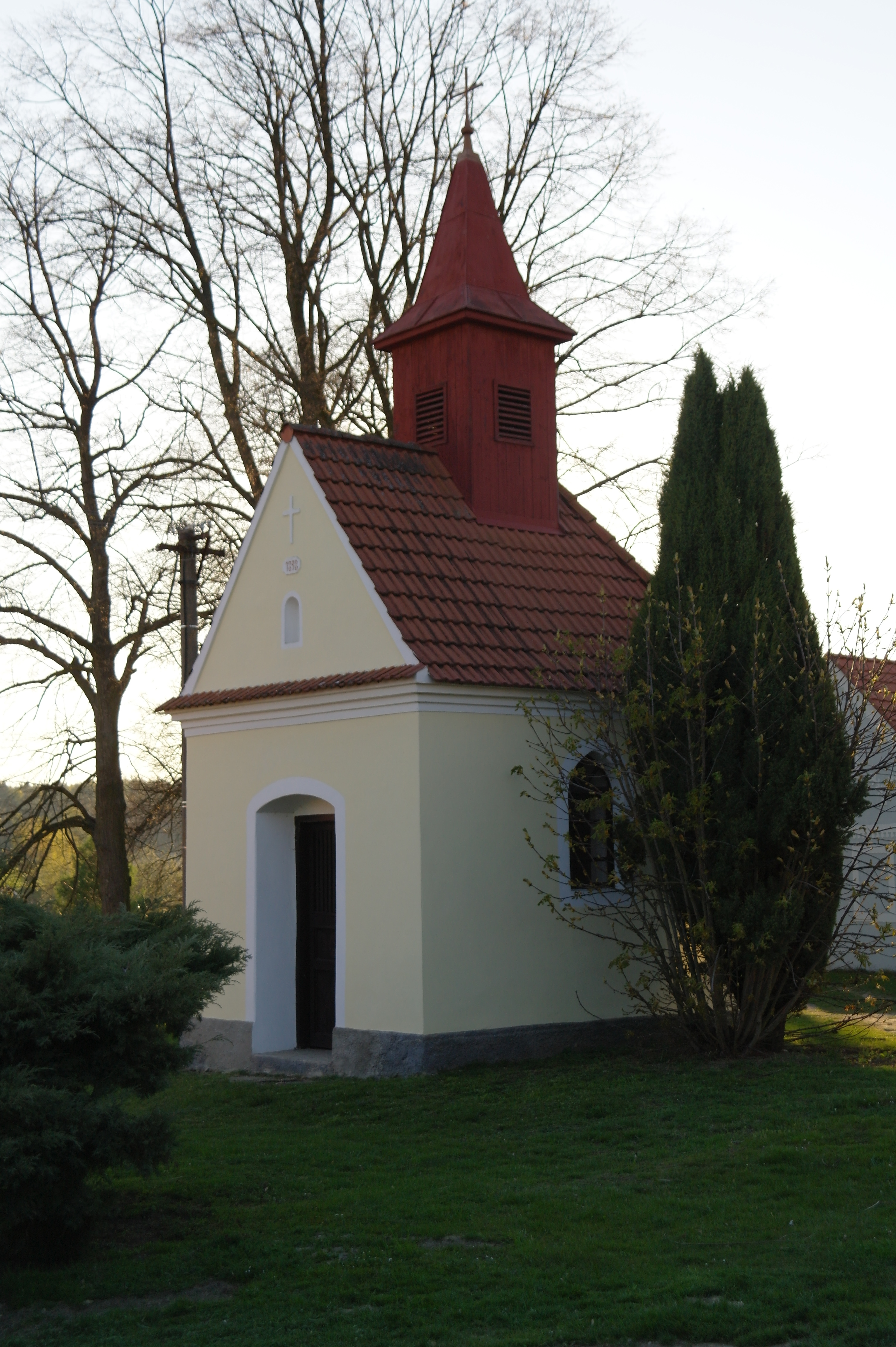 Dudov. Česká republika.